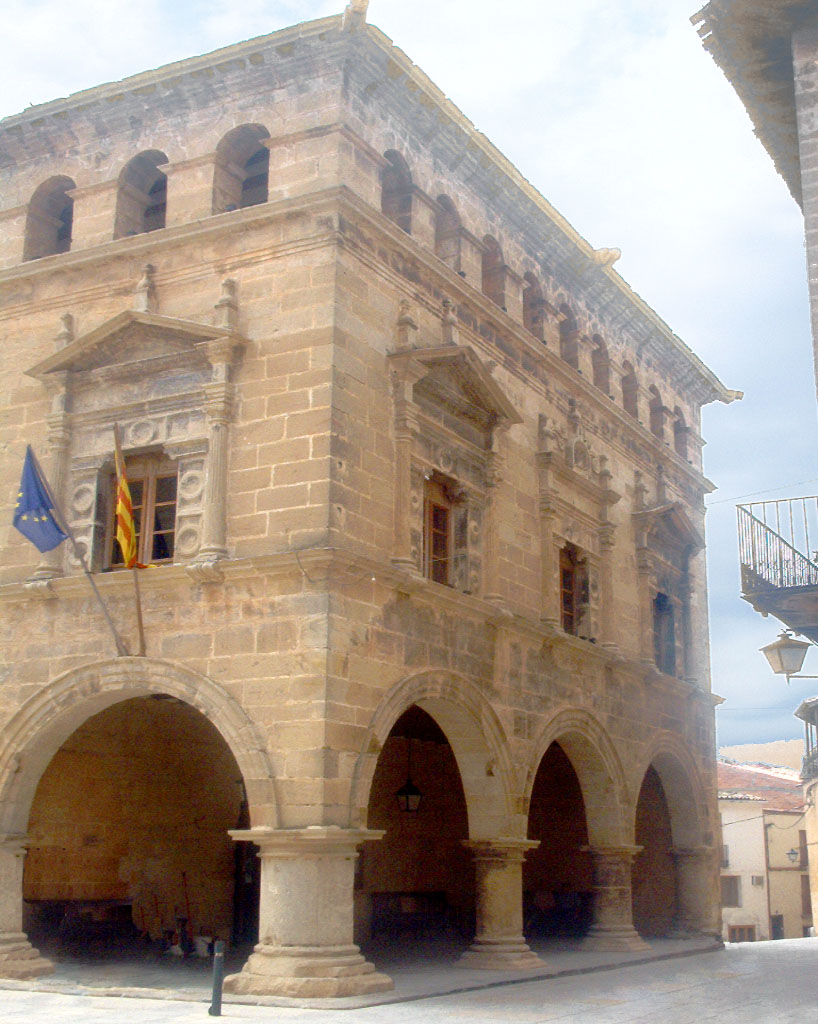 El d'Arnes és un dels més bonics ajuntaments renaixentistes que tan abunden als pobles de l Terra Alta i el Matarranya. Són característics els atris porxats, l'escala monumental, les primeres plantes nobles amb finestres molt treballades i la galeria del segon pis amb arcs, El modernisme va copiar aquest model en algunes de les seves obres, tot i que amb una altra mena de decoració.